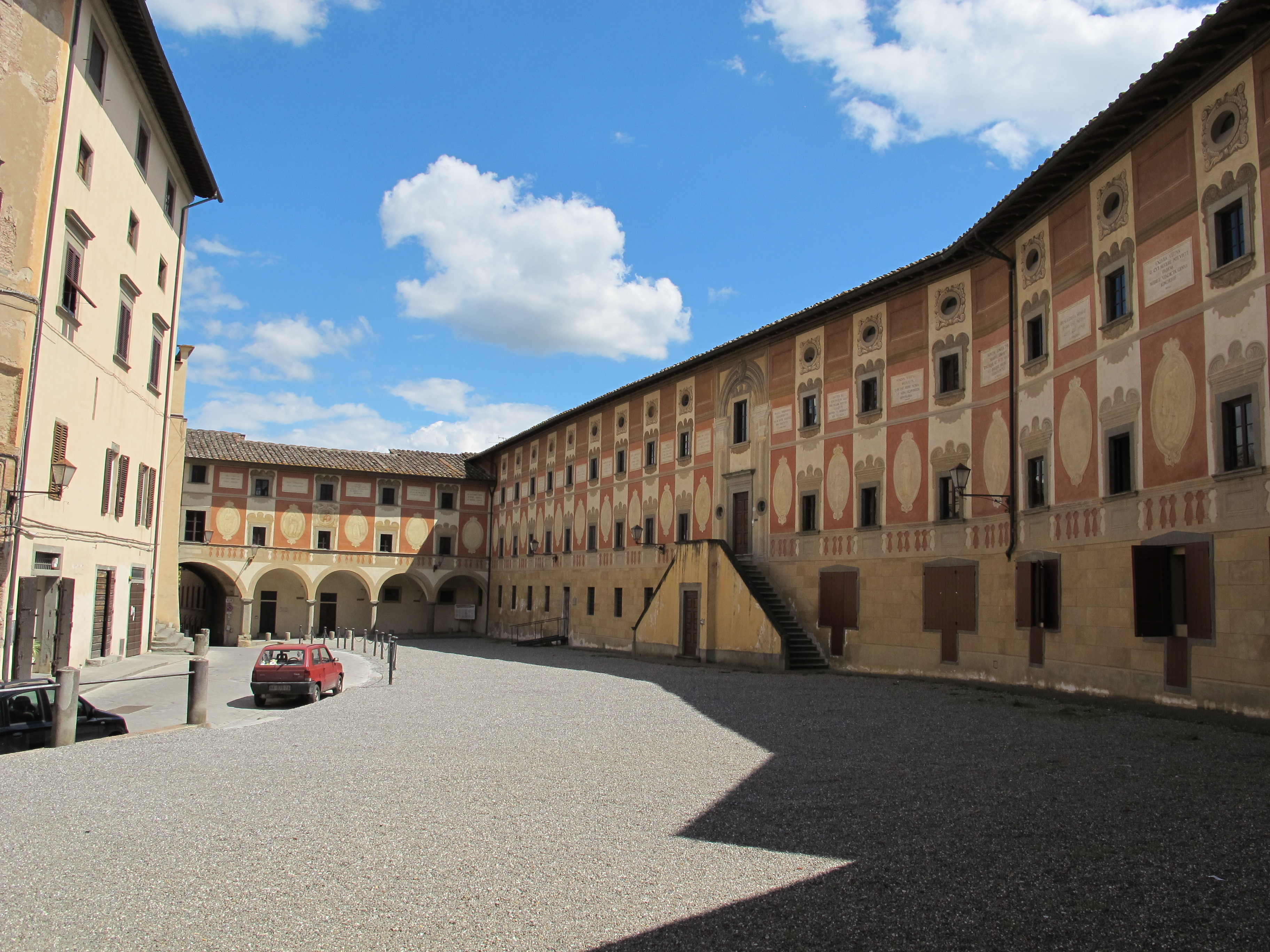 Saminario di san miniato